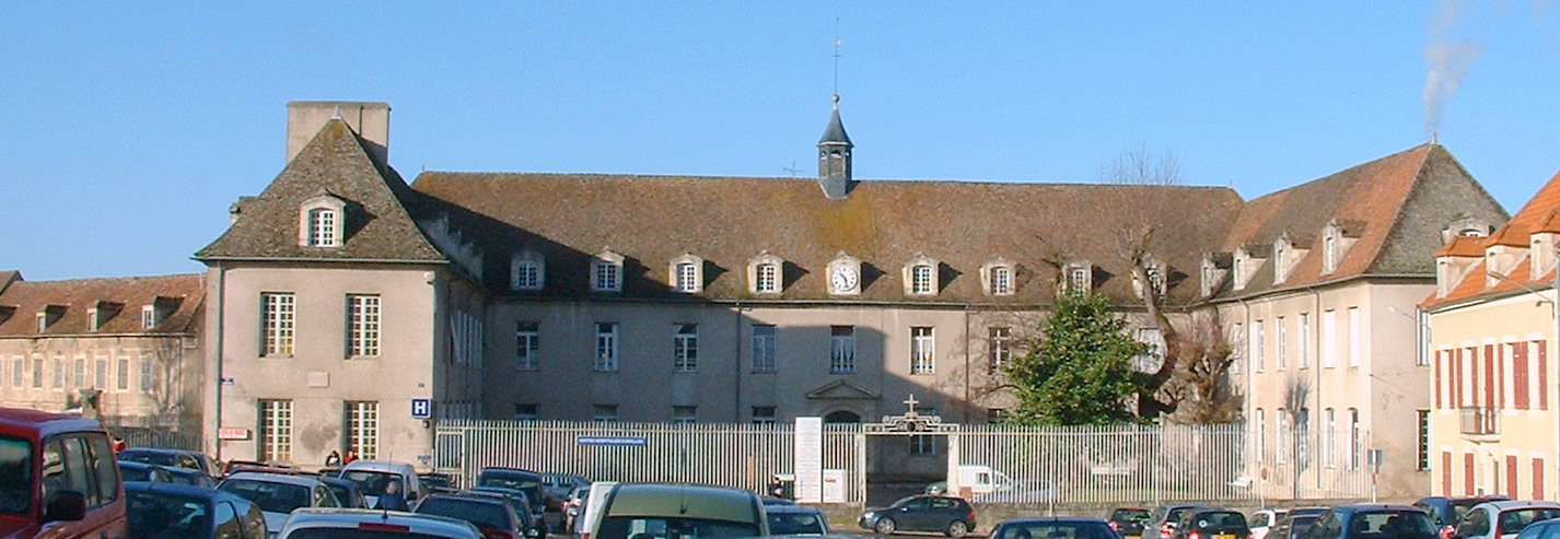 Avallon : l'hôpital